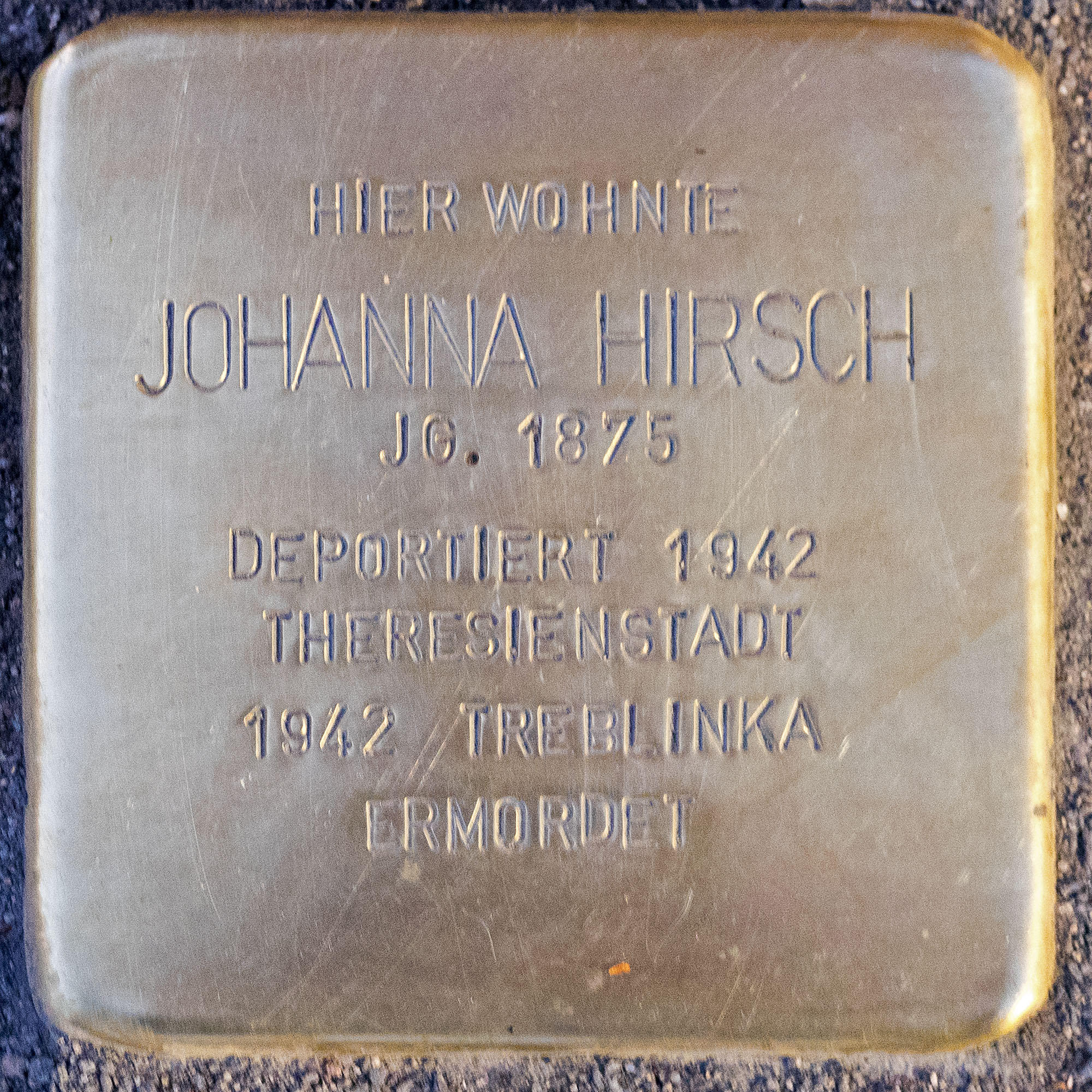 2016 11 25 Stolpersteine Kempen Hirsch Johanna